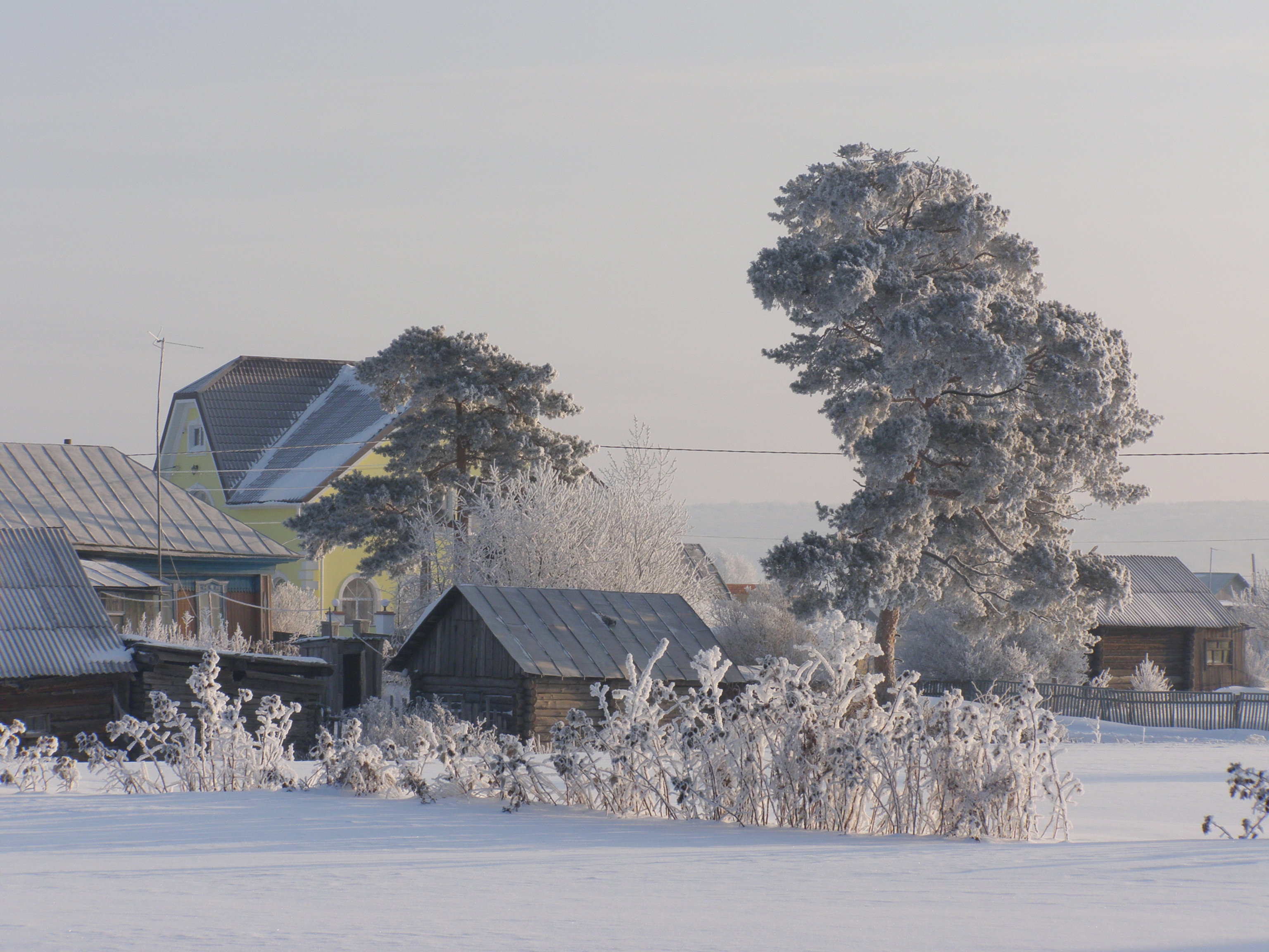 Сосны